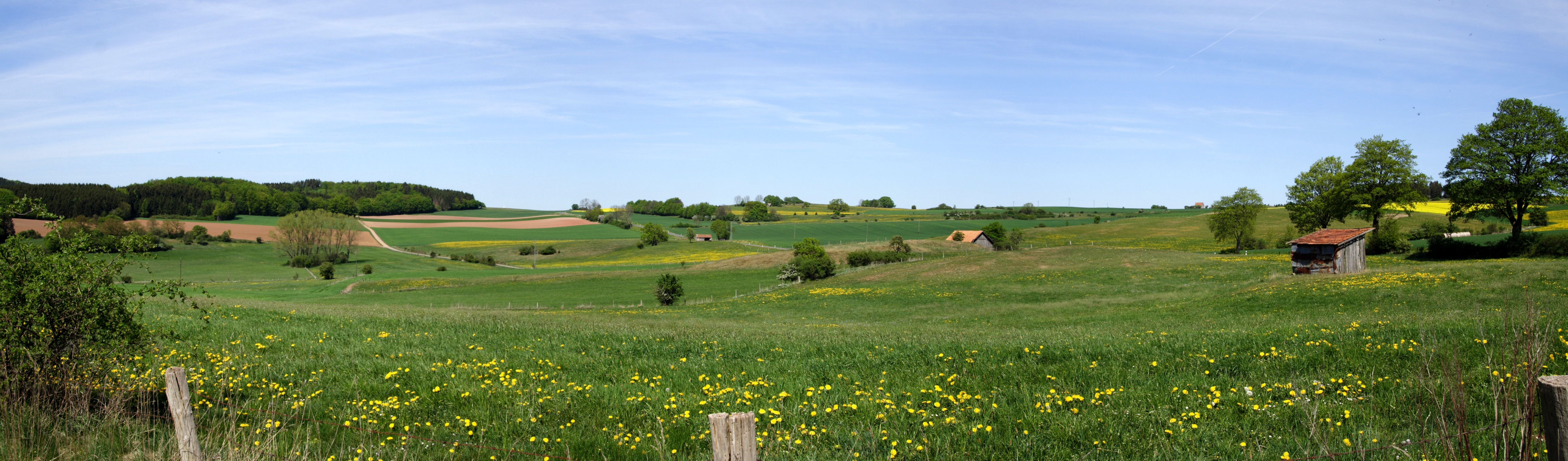 90 Grad Panorama am Martenberg Richtung Nordosten